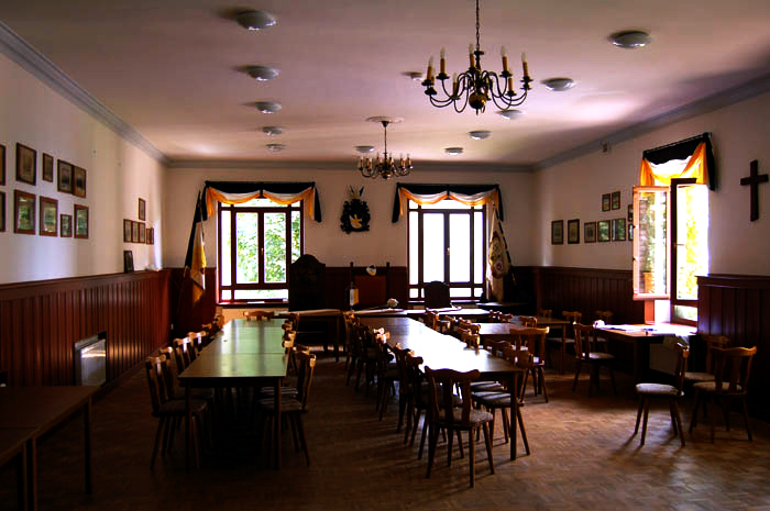 Kneipsaal des Wingolfshauses in Halle (Saale)